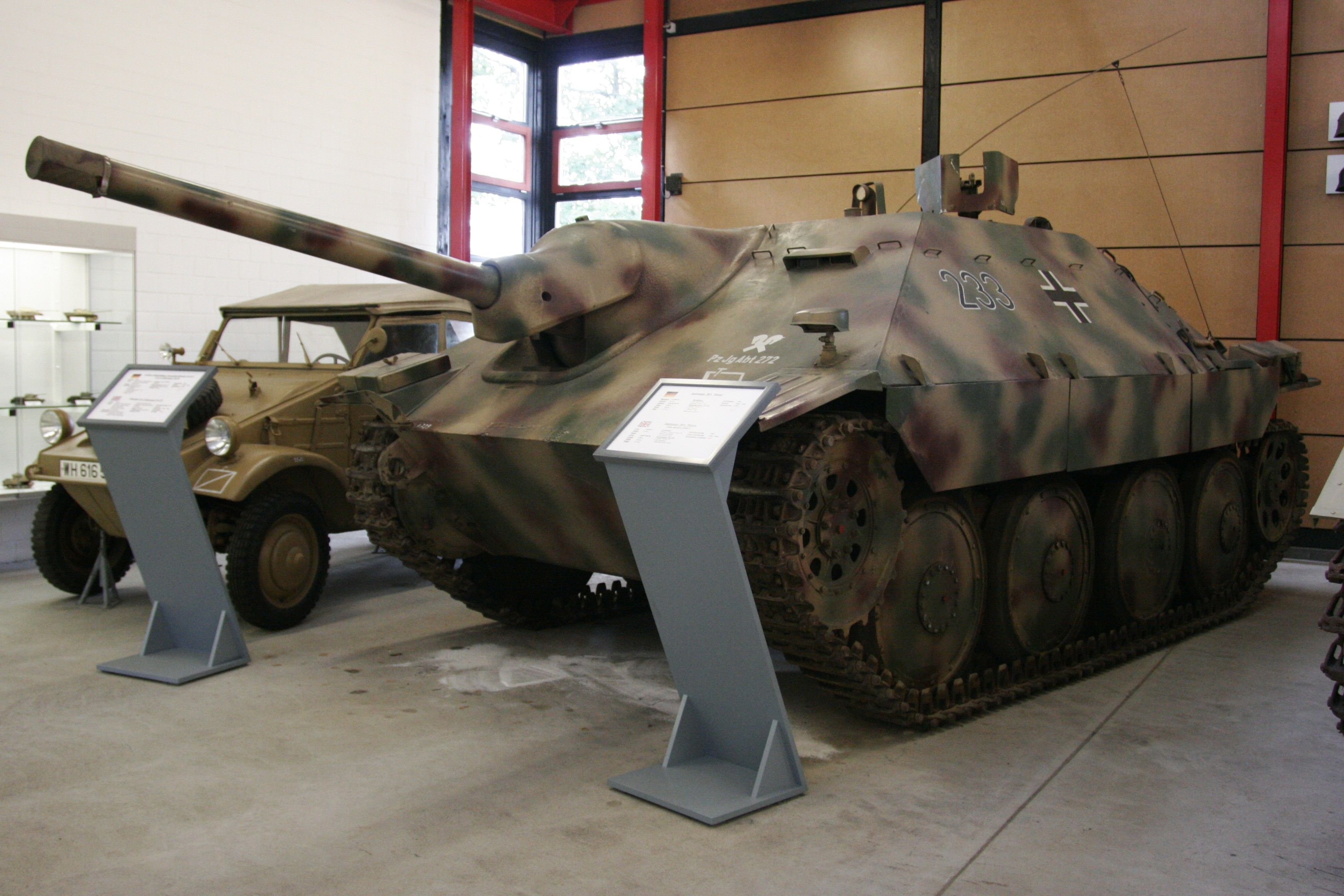 Jagdpanzer 38(t) (Sd.Kfz. 138/2) on display at the Deutsches Panzermuseum Munster , Germany.